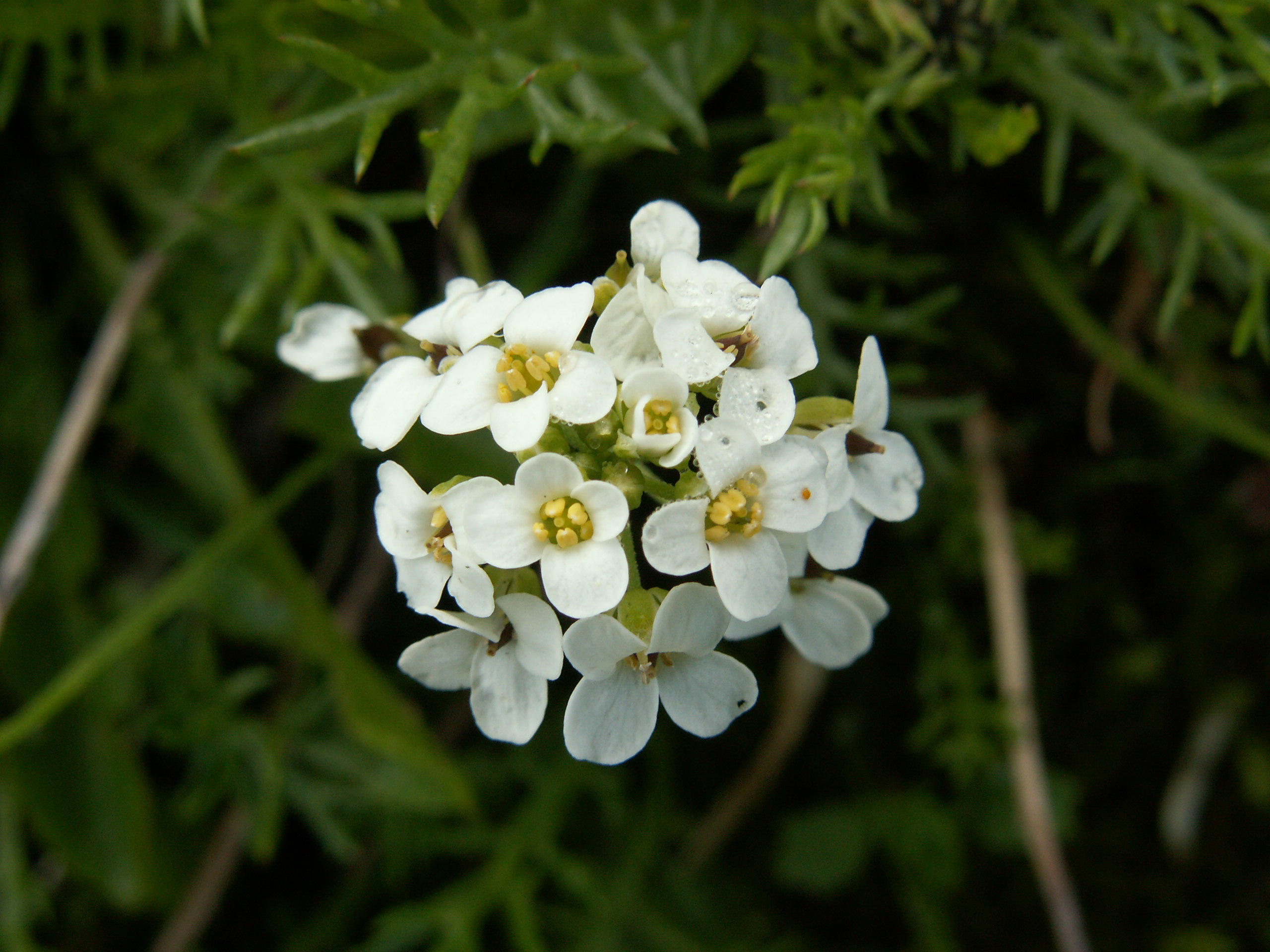 Pritzelago alpina, Schynige Platte, Kanton Bern, Schweiz